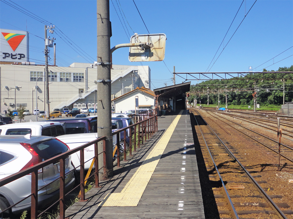 富山地方鉄道稲荷町駅 不二越・上滝線ホーム